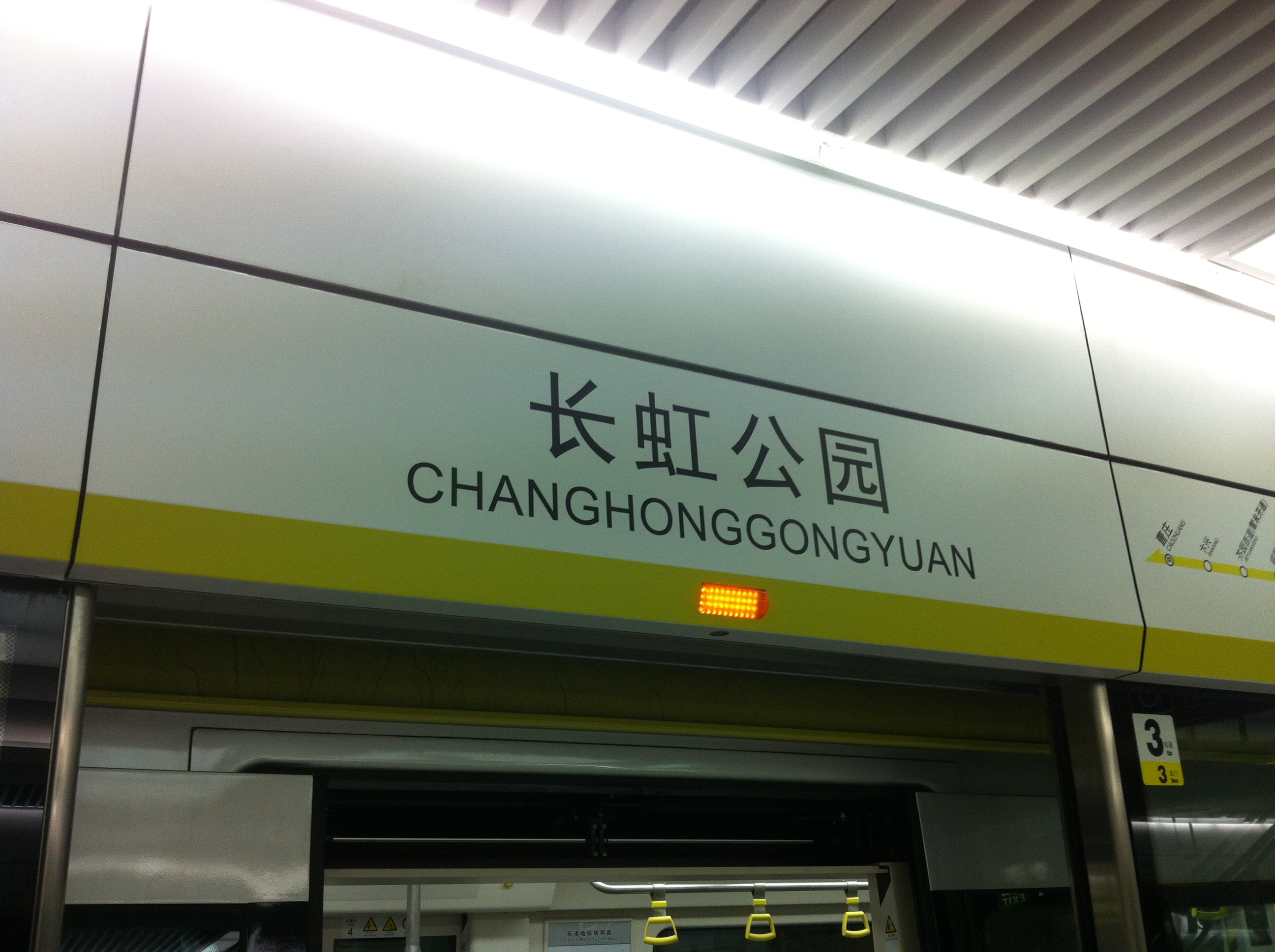 长虹公园站